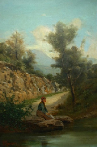 Lavandaia al fiume, olio su tela, 76 x 51 cm., coll. privata